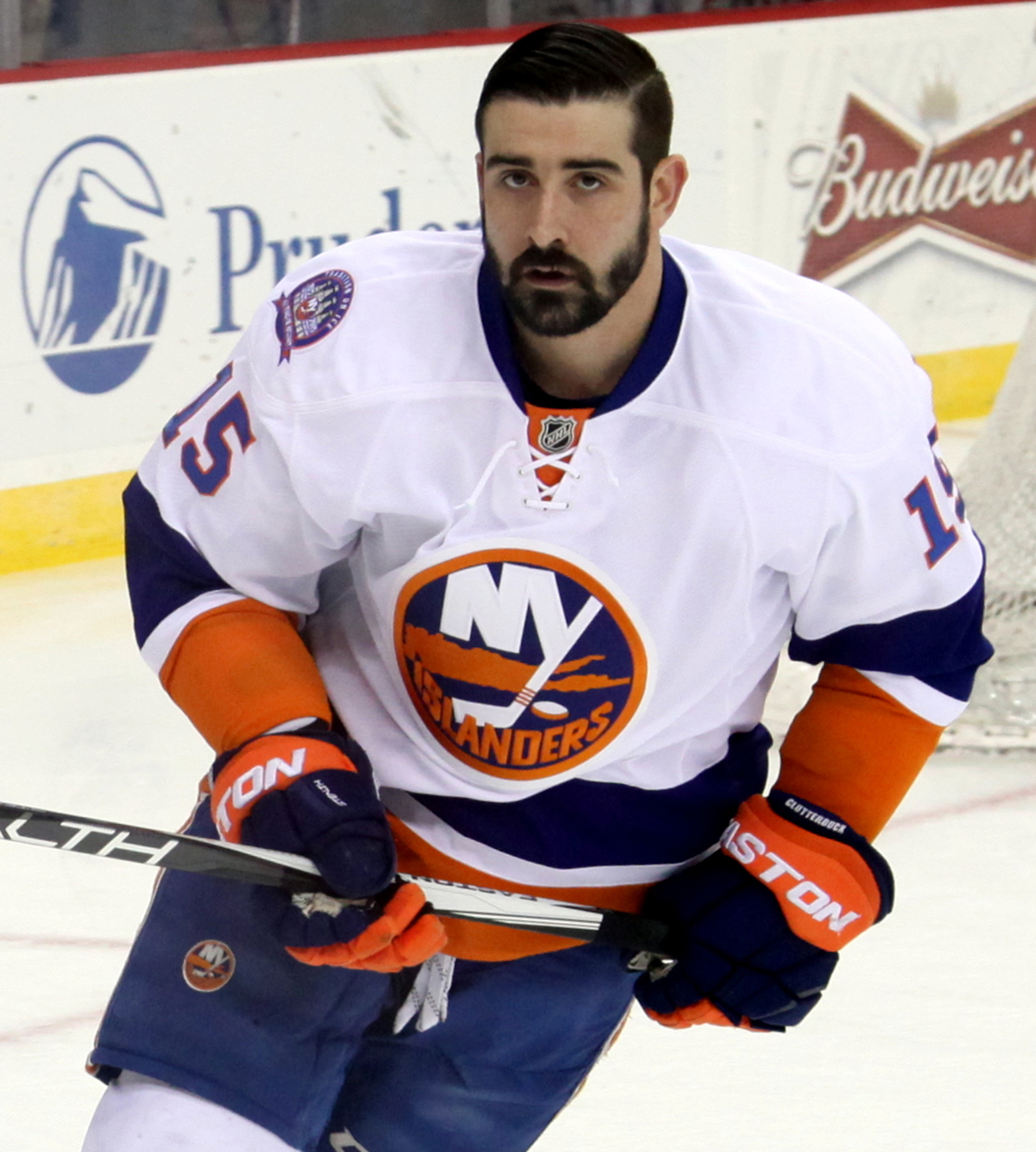 Clutterbuck in March 2015.